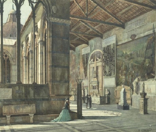 "I chiostri del Camposanto monumentale di Pisa", acquerello, 43.2 x 56,5 cm.